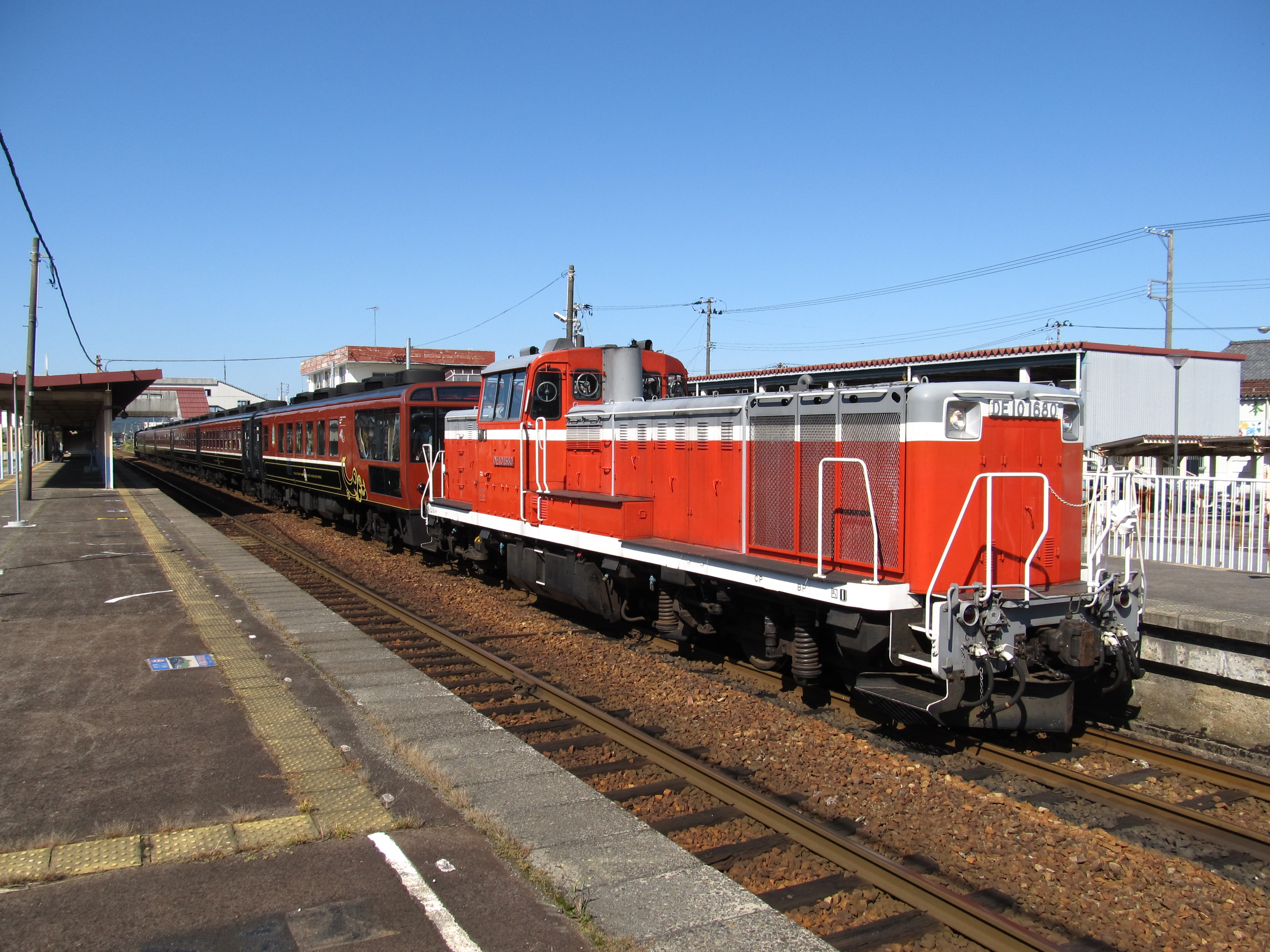 東日本旅客鉄道（JR東日本）磐越西線五泉駅1番線に停車中の馬下行き臨時快速列車「DLばんえつ物語体験号」。 2014年10月12日に五泉駅2番線・3番線ホームから撮影。